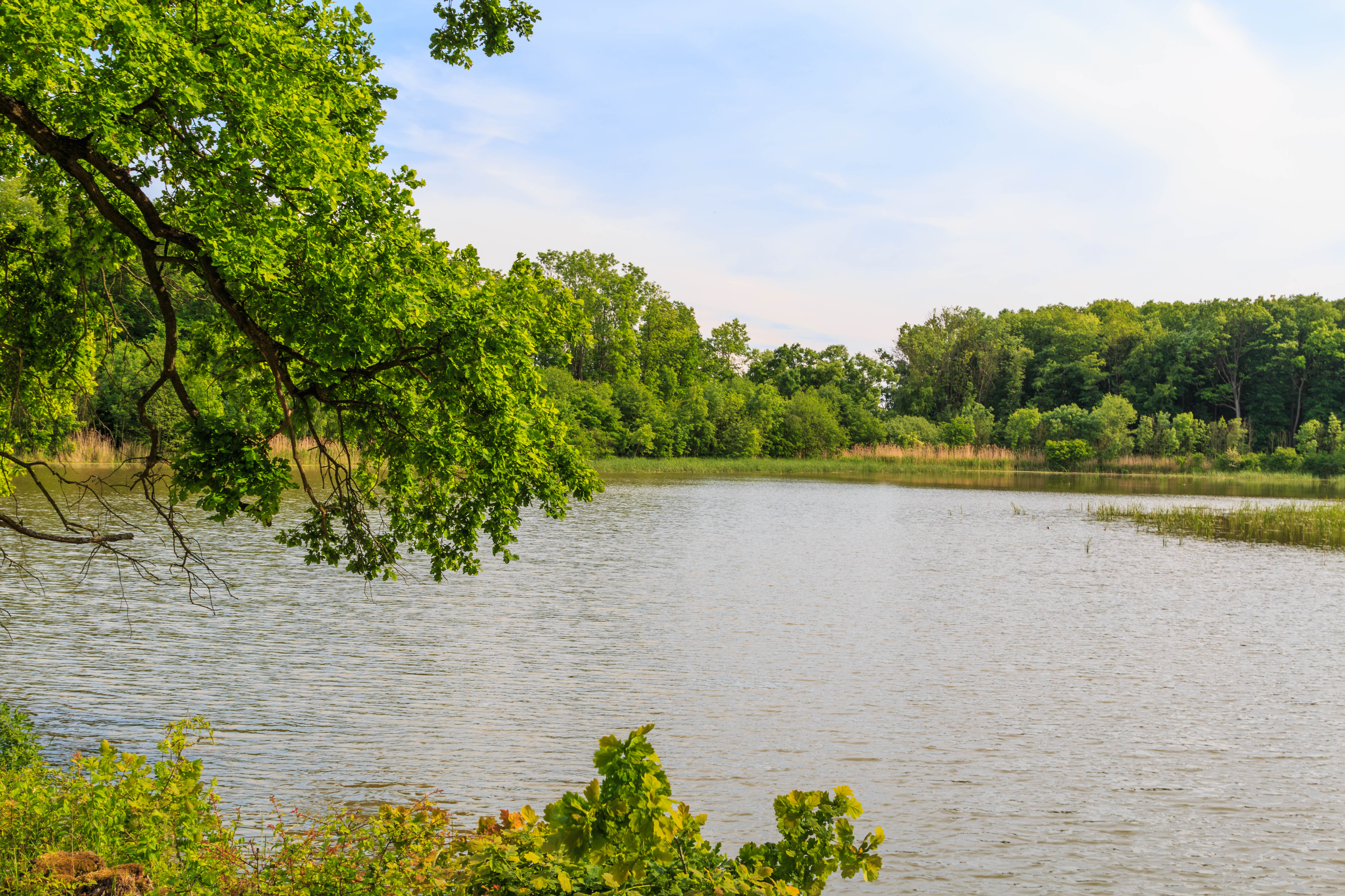 Přírodní památka Hluboký Kovač Project: Chráněná území.